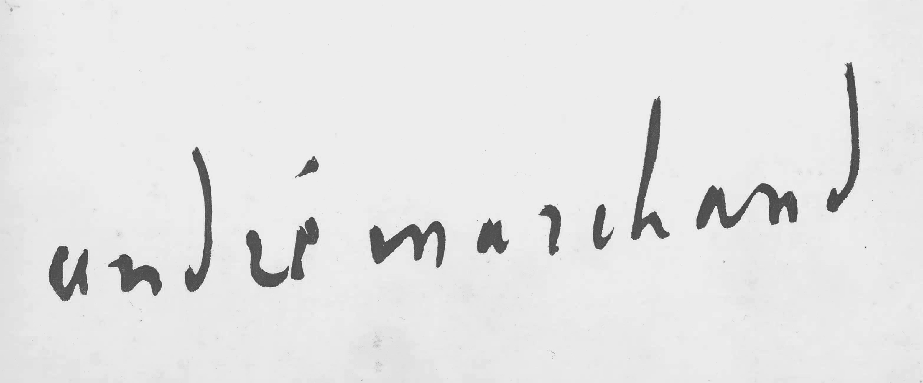 Signature du peintre français André Marchand, scan d'après couverture catalogue. This signature is believed to be ineligible for copyright and therefore in the public domain because it falls below the required level of originality for copyright protection both in the United States and in the source country (if different). In this case, the source country (e.g. the country of nationality of the signatory) is believed to be France. Cette image ou le texte qui y est représenté est seulement composé de formes géométriques simples et de texte. Elle n’atteint pas le seuil d'originalité nécessaire pour la protection du droit d’auteur, et est donc du domaine public. See autographs of Magritte and Picasso